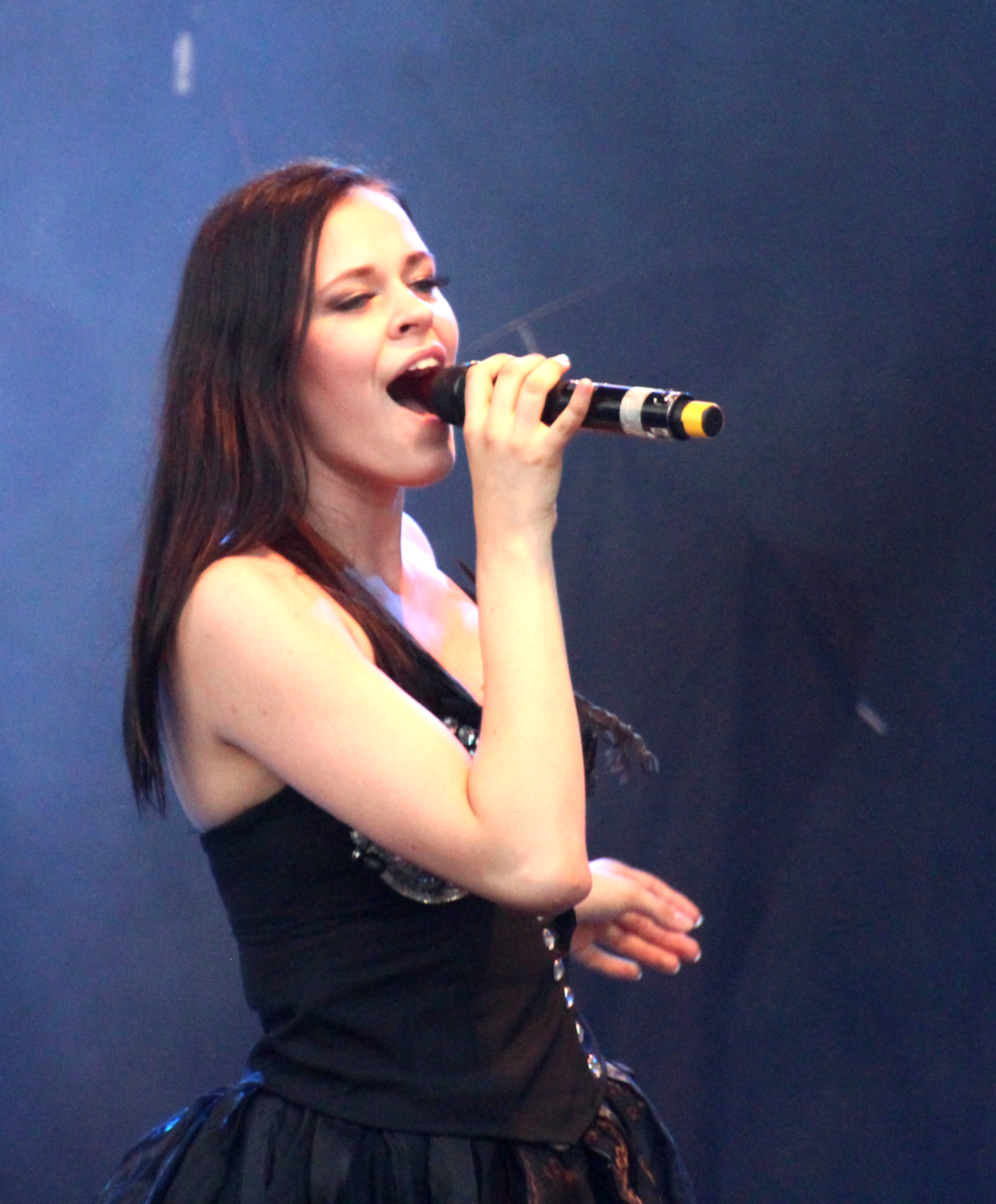 Rosanna Lints esinemas Õllesummeril.